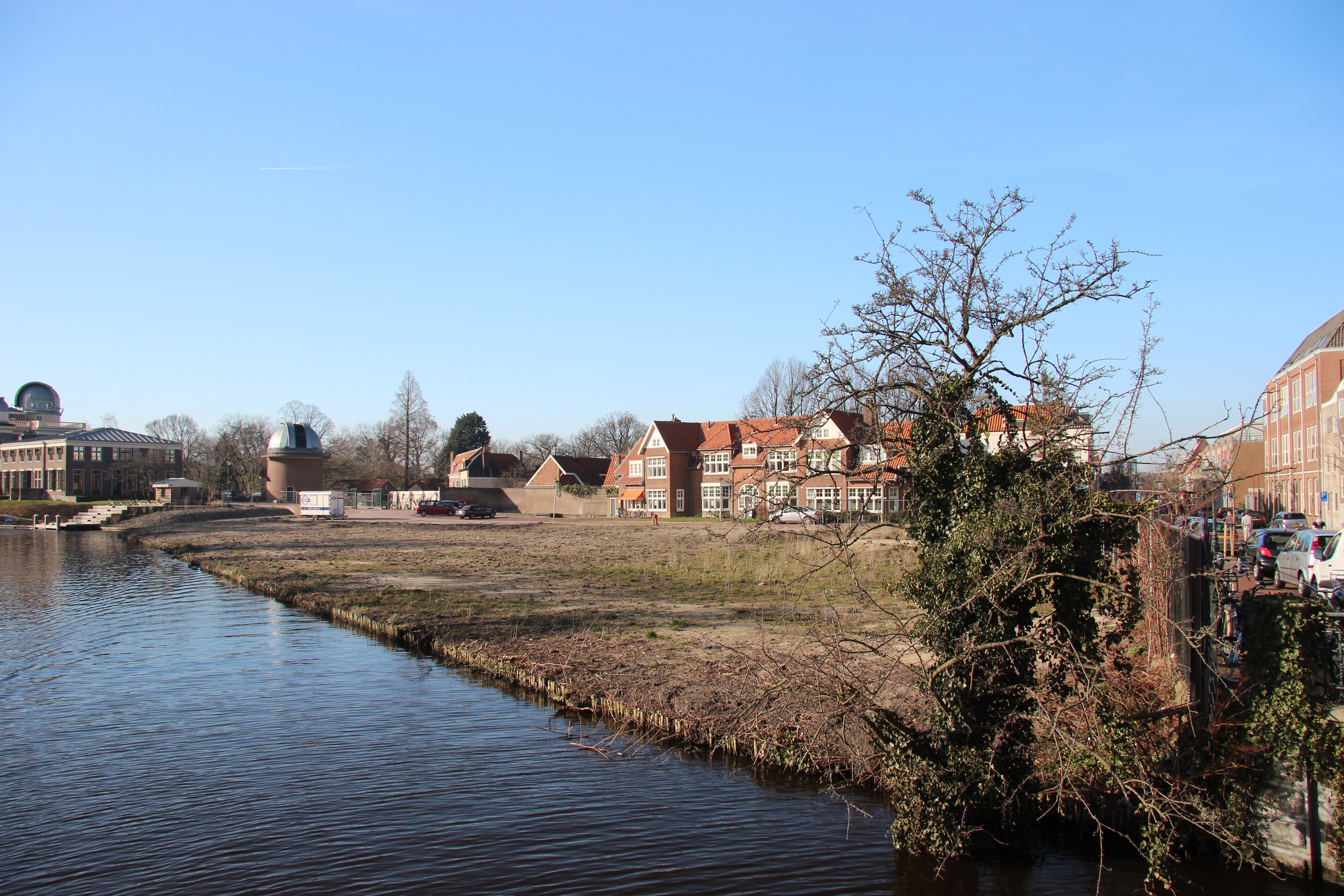 Een potentieel nieuw stadspark in Leiden op de open plek waar het Van der Klaauw Laboratorium stond.